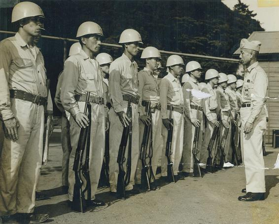 警備隊員を査閲する鹿目警備隊長